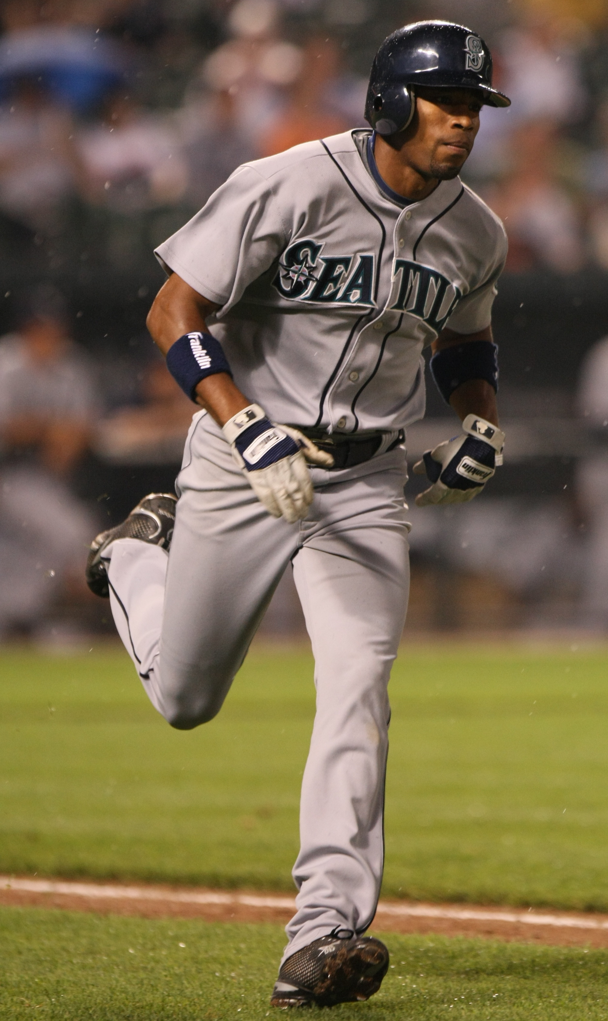 Endy Chávez